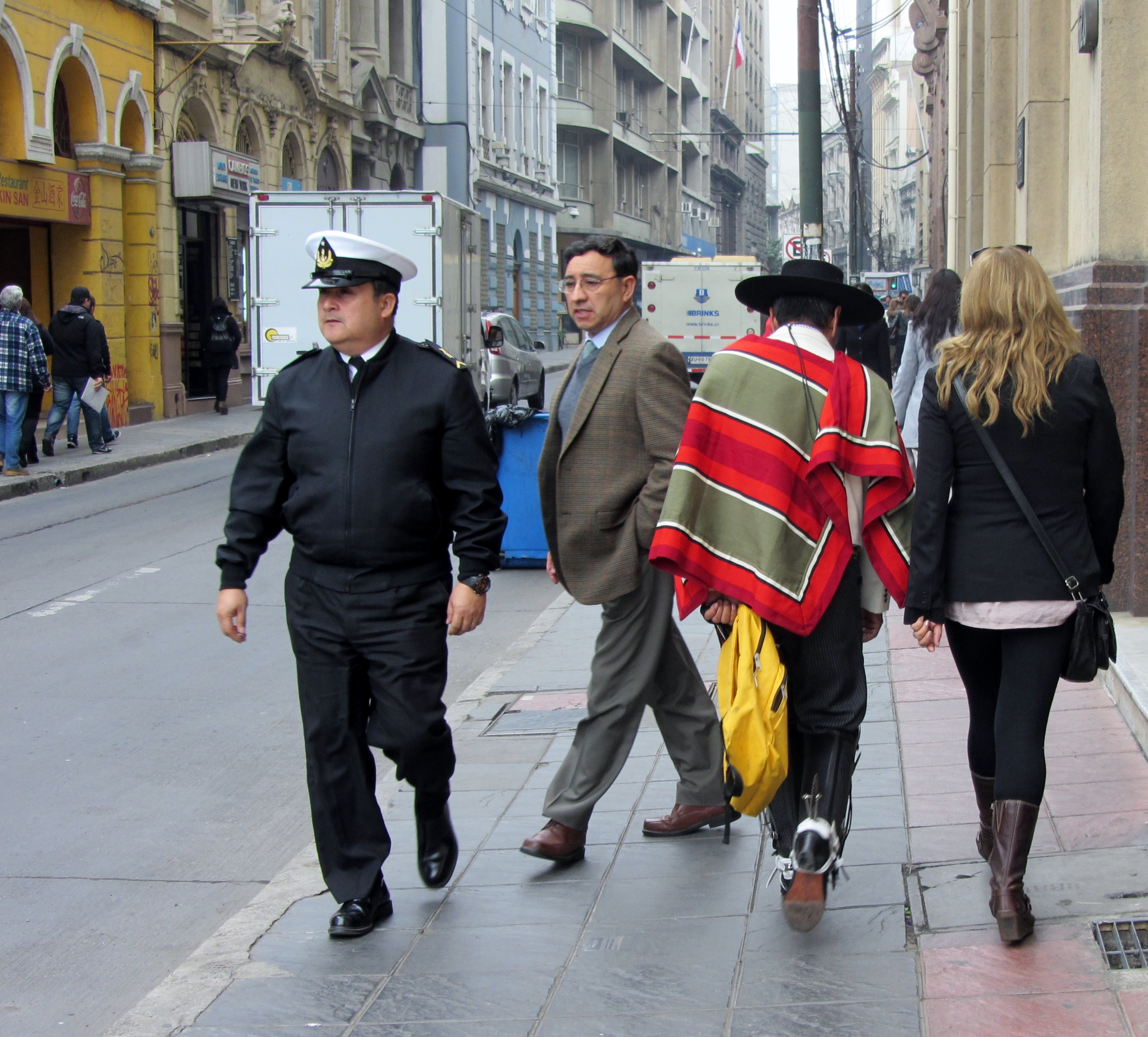 Gente en calle Esmeralda, Valparaíso